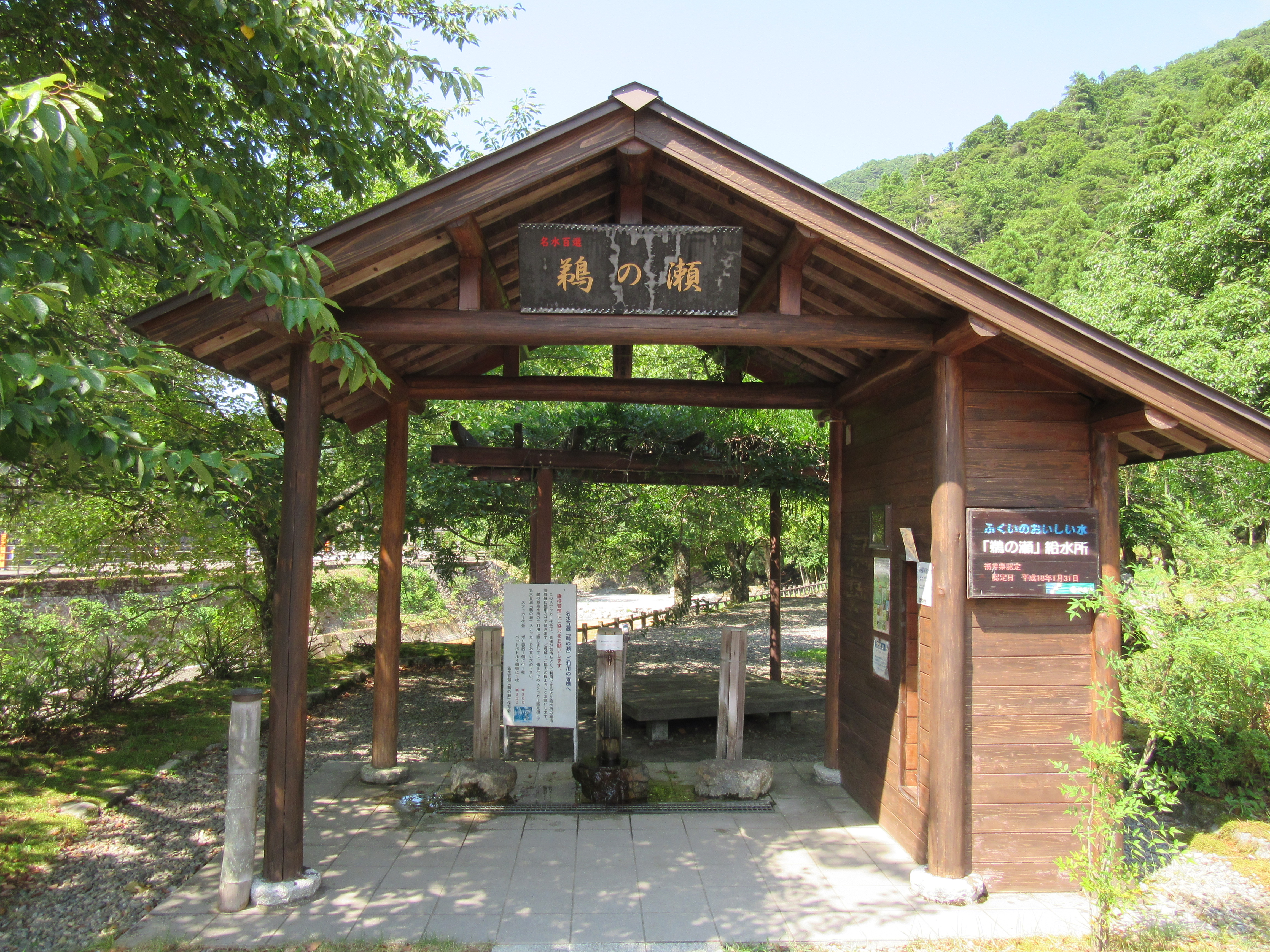 鵜の瀬給水所